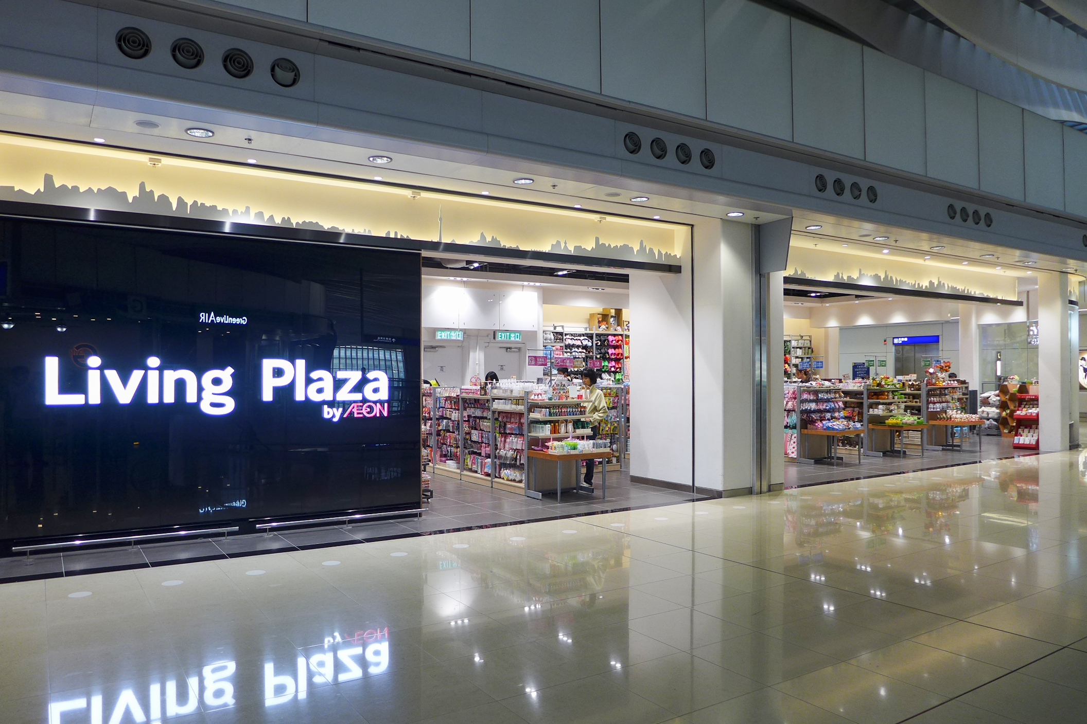 AEON Living Plaza in Skyplaza